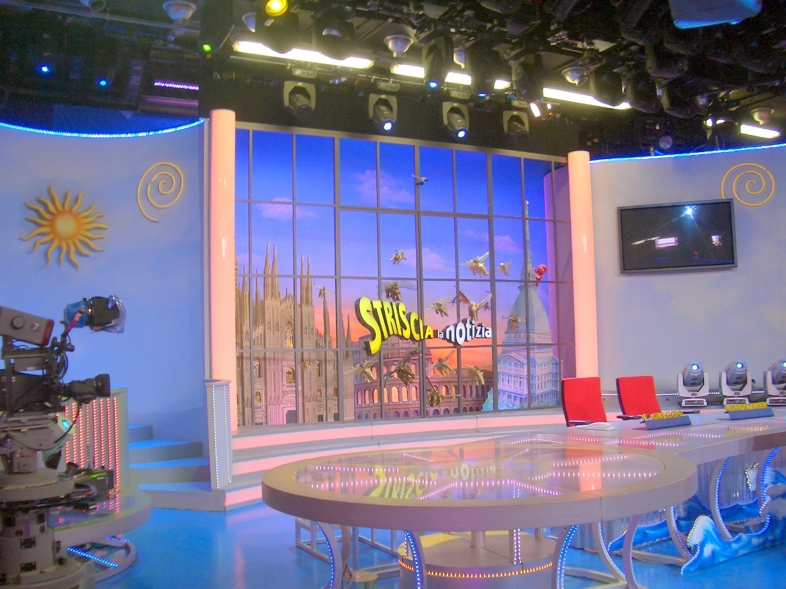 negli studi a Milano 2